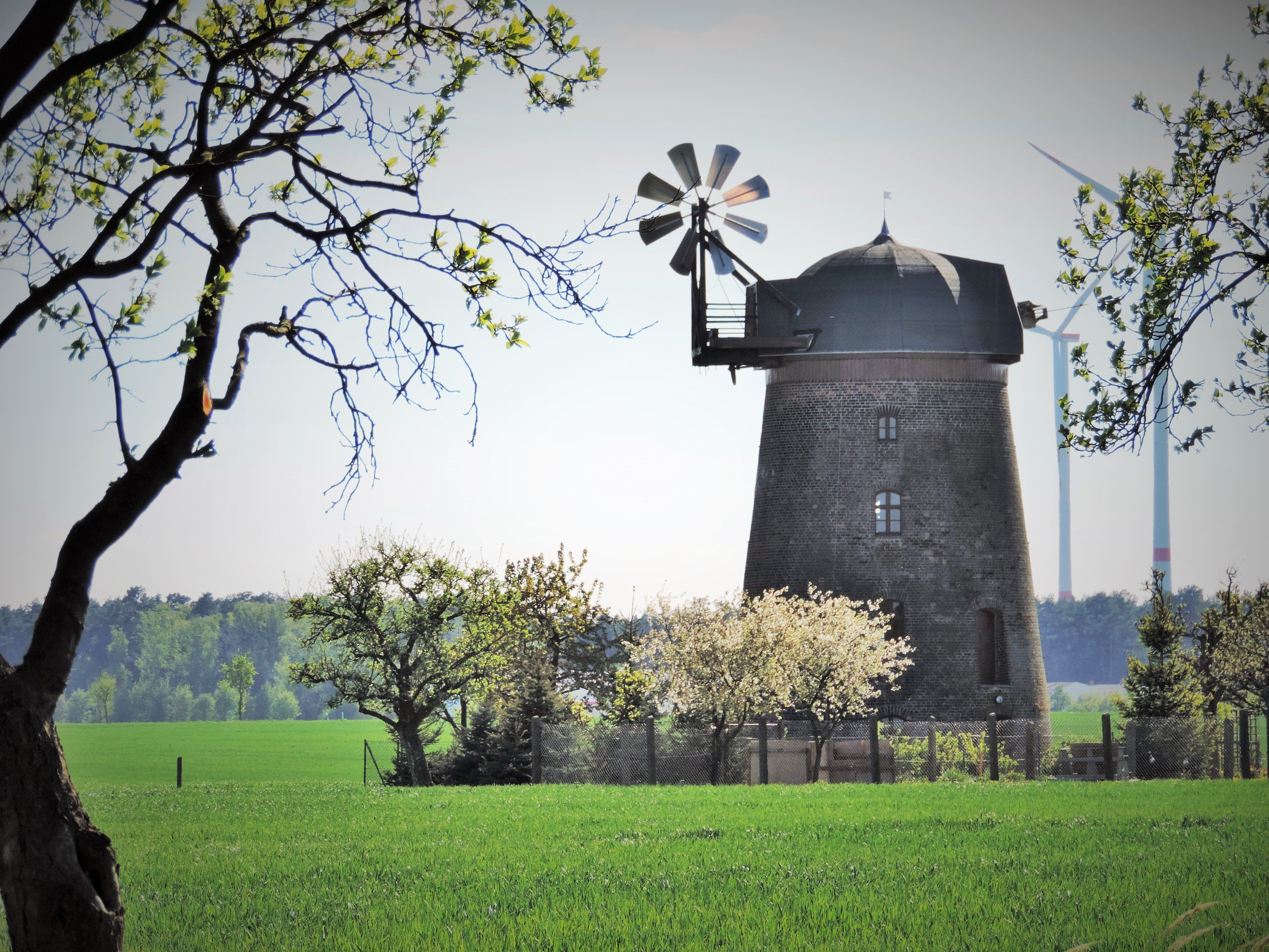 Turmwindmühle mit Windrose in Naundorf bei Seyda (Sachsen-Anhalt)